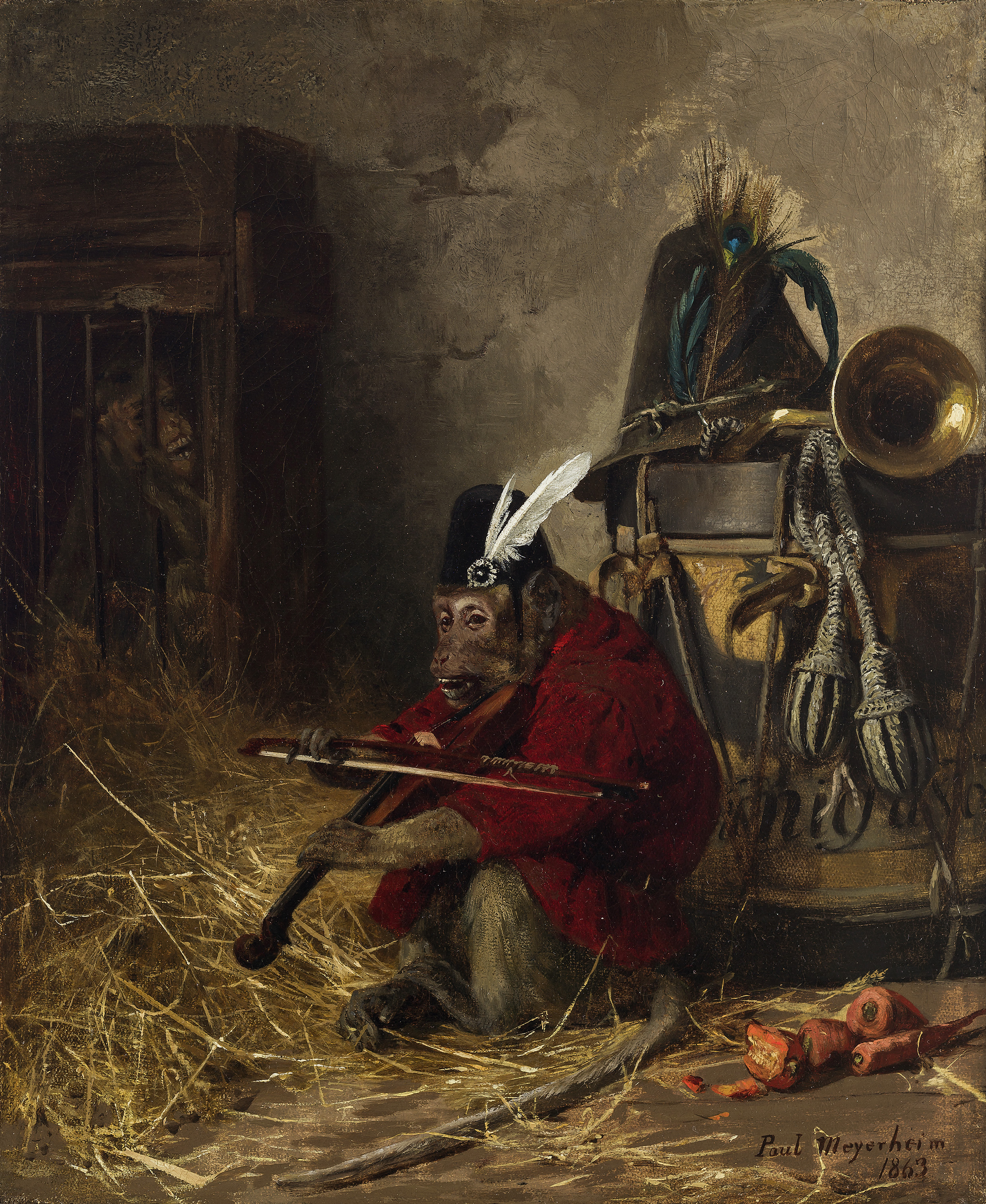 Paul Meyerheim: Geigender Affe. Öl auf Leinwand, 31,5 x 26,5 cm, rechts unten signiert und datiert